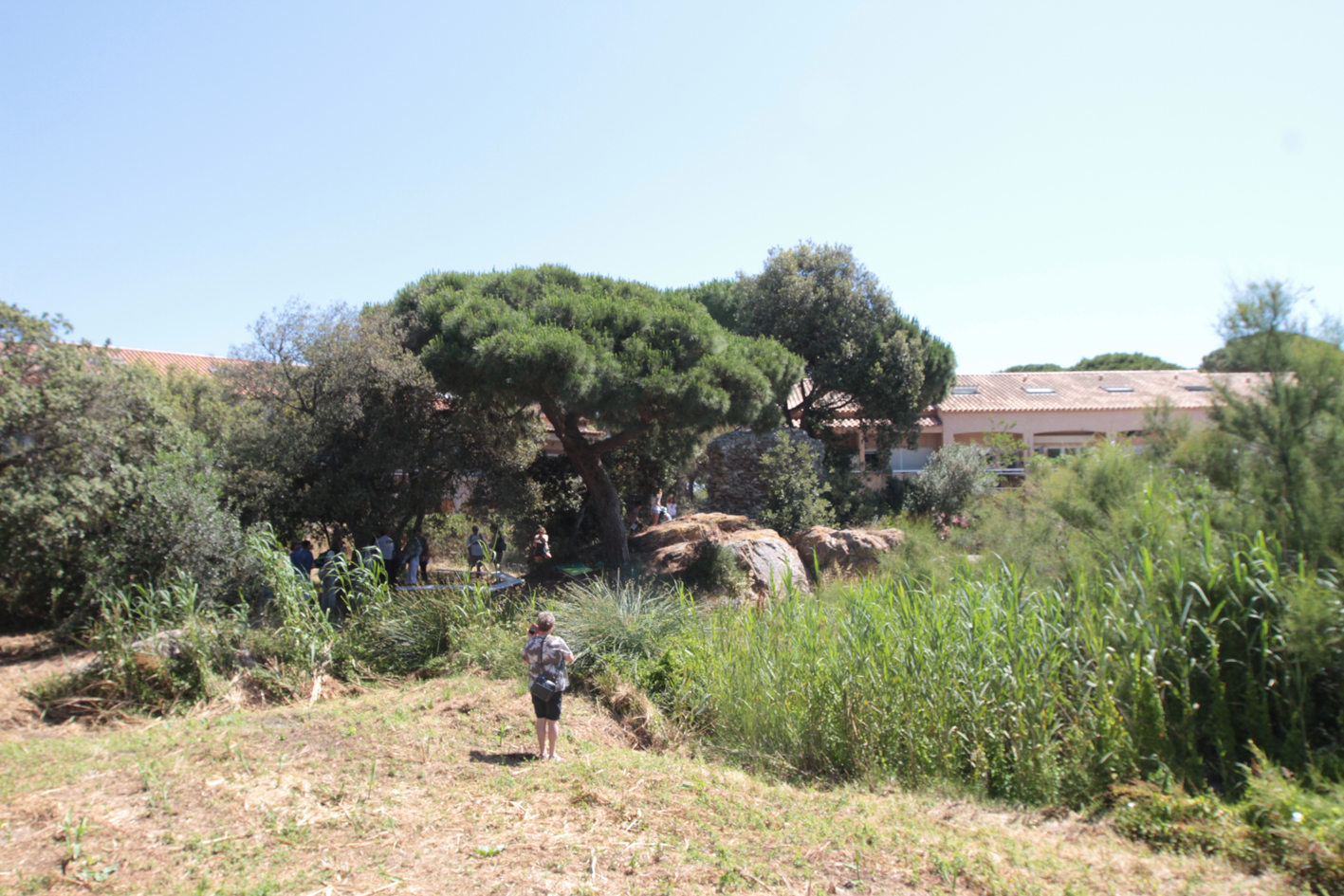 Vue de la zone humide s'étendant au sud du sanctuaire d'Aristée, sur la droite.